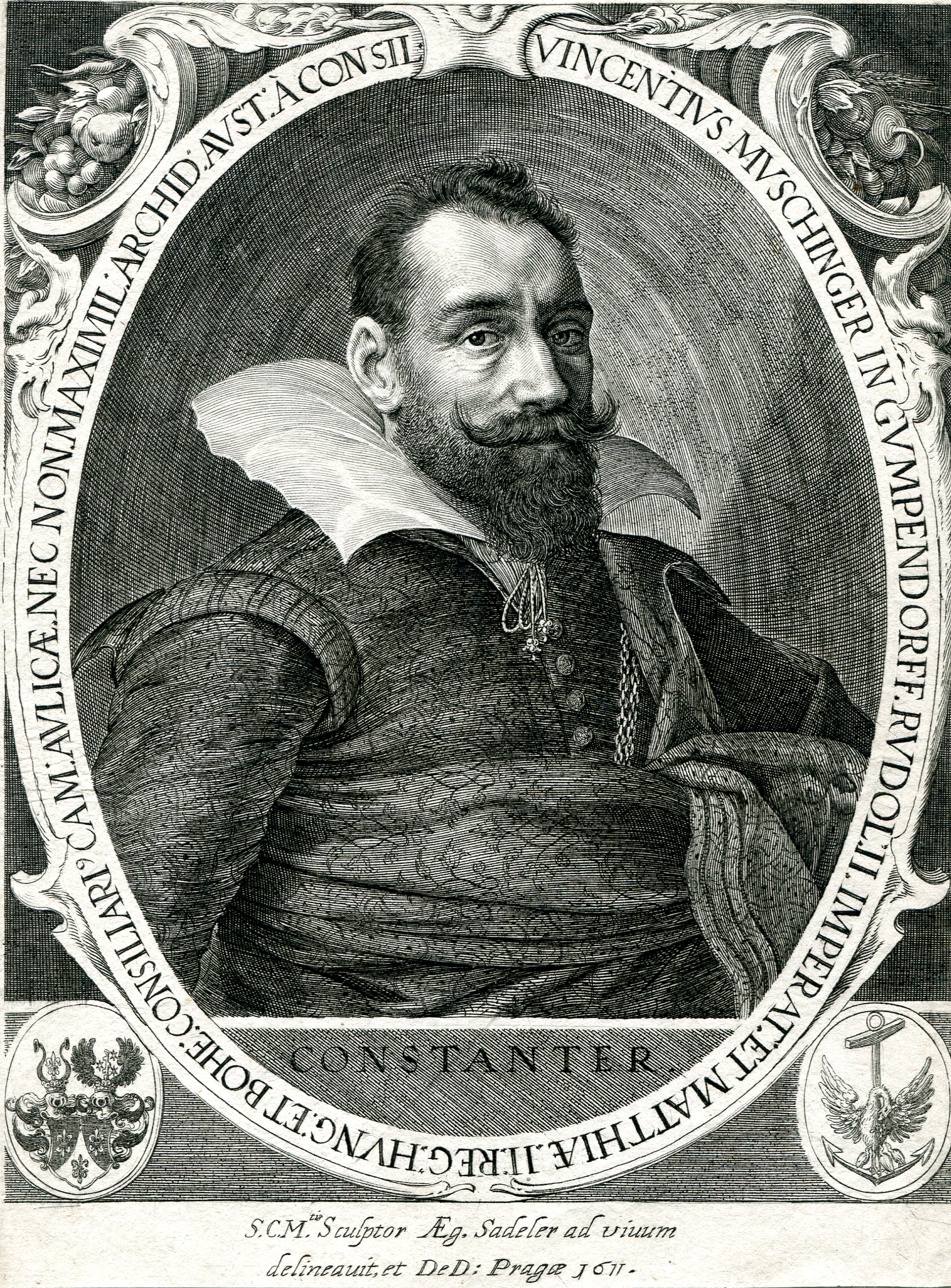 Vinzenz Muschinger, gest. 1628, österreichischer Hofkammerrat, Besitzer der Herrschaften Gumpendorf, Gars, Horn, Raan und Rosenburg.